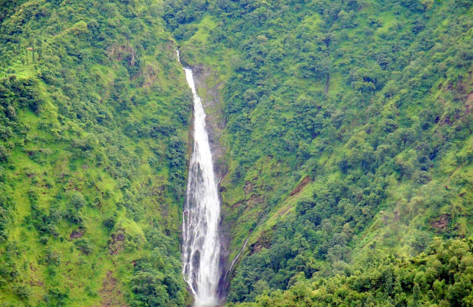 नेपाली: सुनछहरी झरना रोल्पा